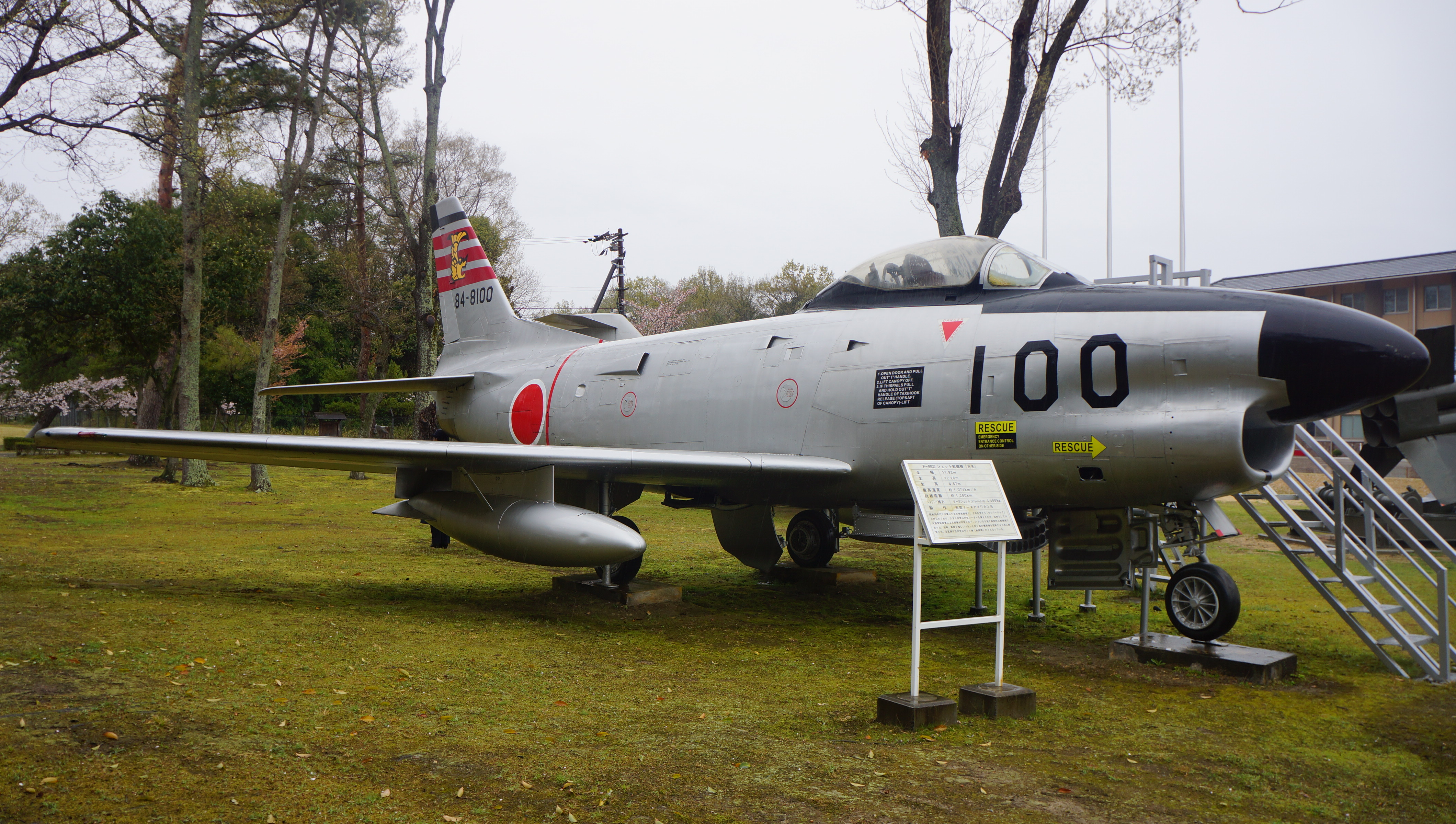 航空自衛隊 F-86D戦闘機。 13年4月6日 航空自衛隊奈良基地にて。